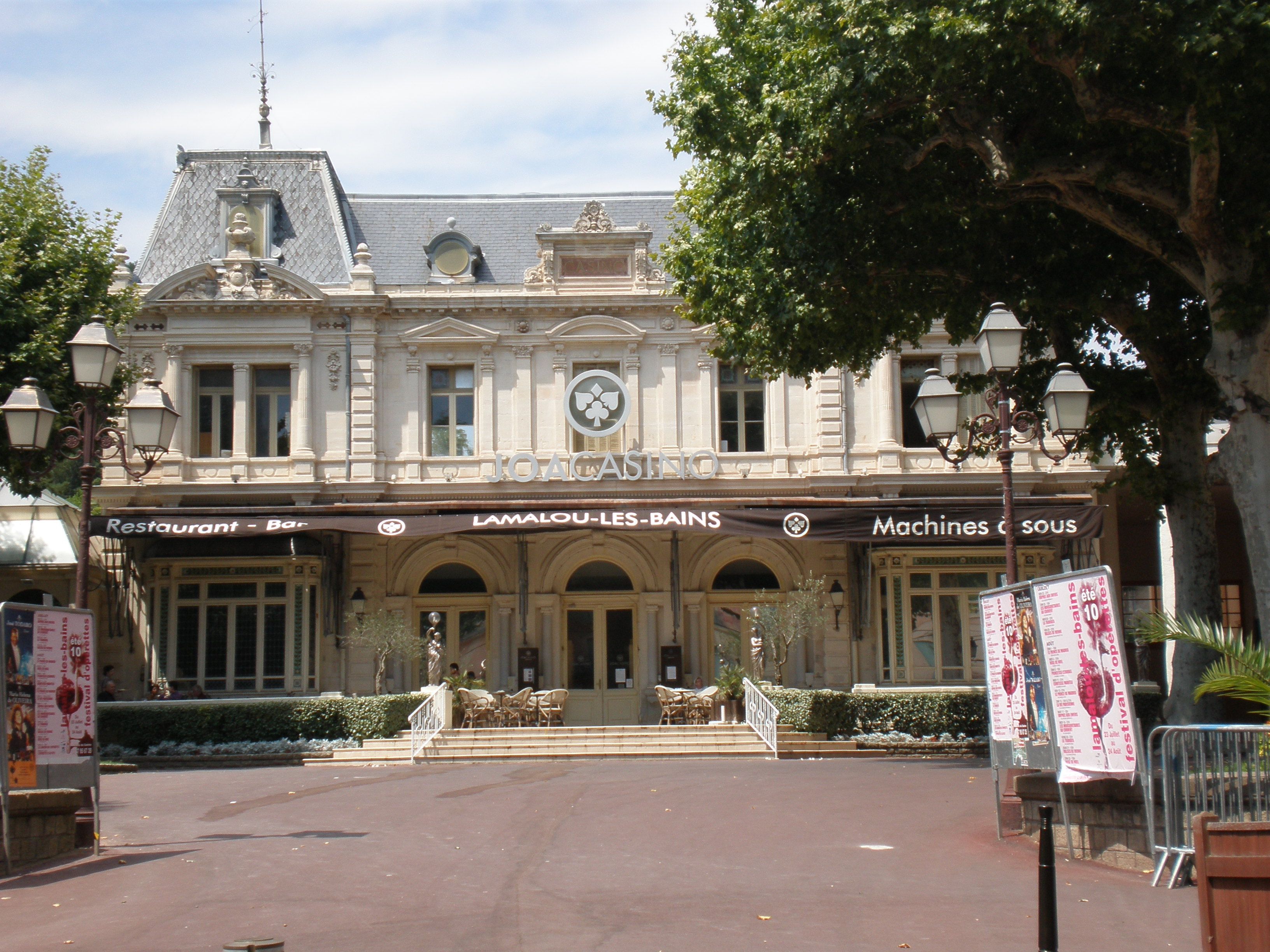 Le casino de Lamalou-les-Bains (Hérault, 34)